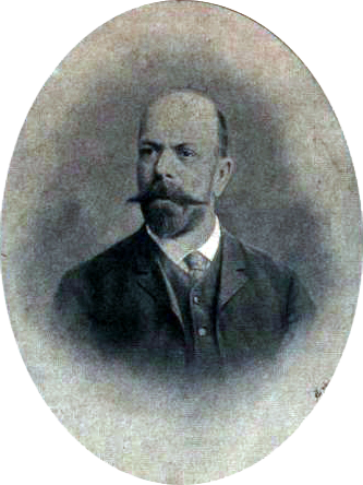 Е.К. Альбрехт (1844 - 1894) - русский музыкант